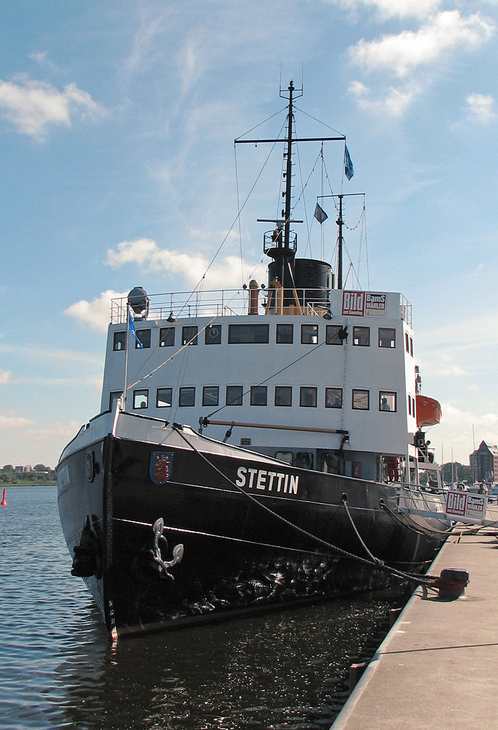 Beschreibung: Dampfeisbrecher Stettin im Rostocker Hafen Fotograf: Darkone, 17. August 2005